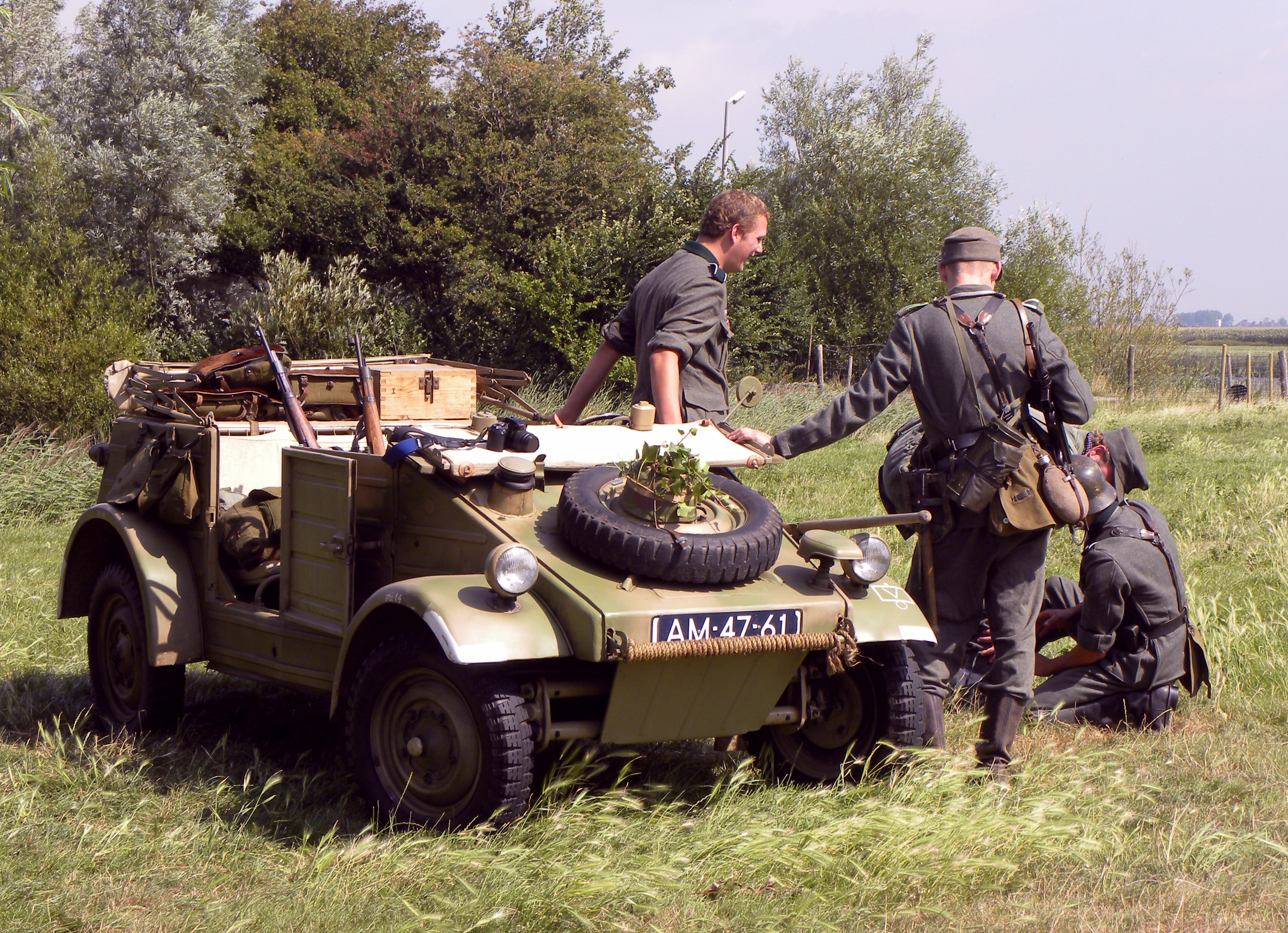 Volkswagen Type 82 Kübelwagen and Re-enactment at Fort Veldhuis